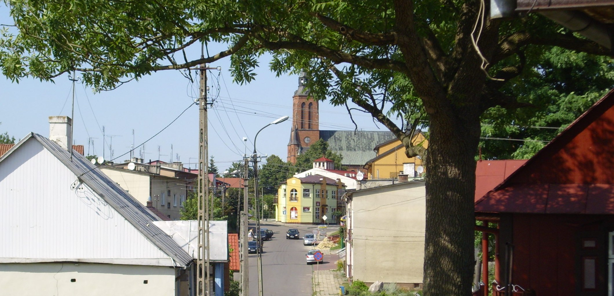 Stoczek Łukowski. Widok na centrum miasta z ul. Szkolnej.